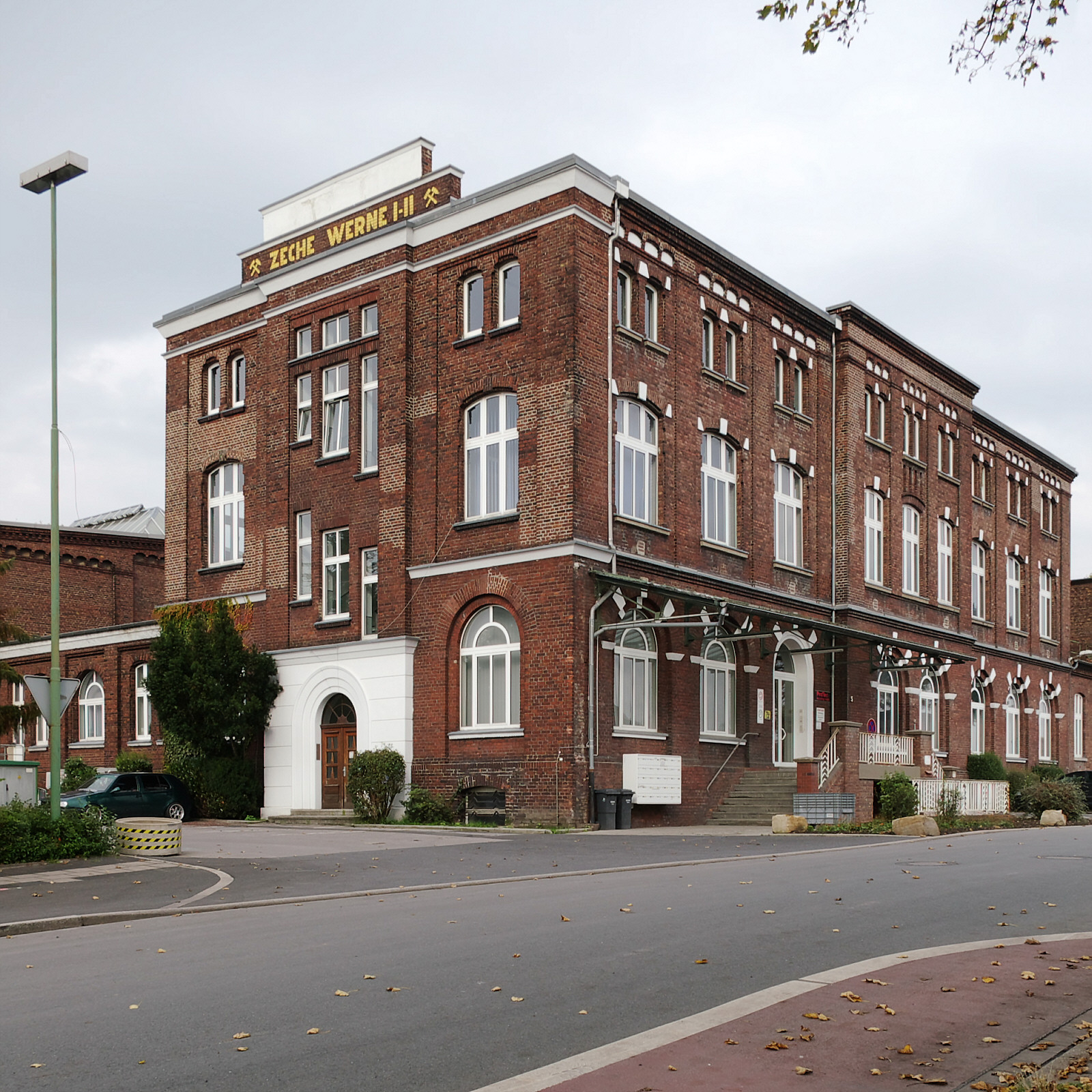 Ehemalige Zeche Werne I/II